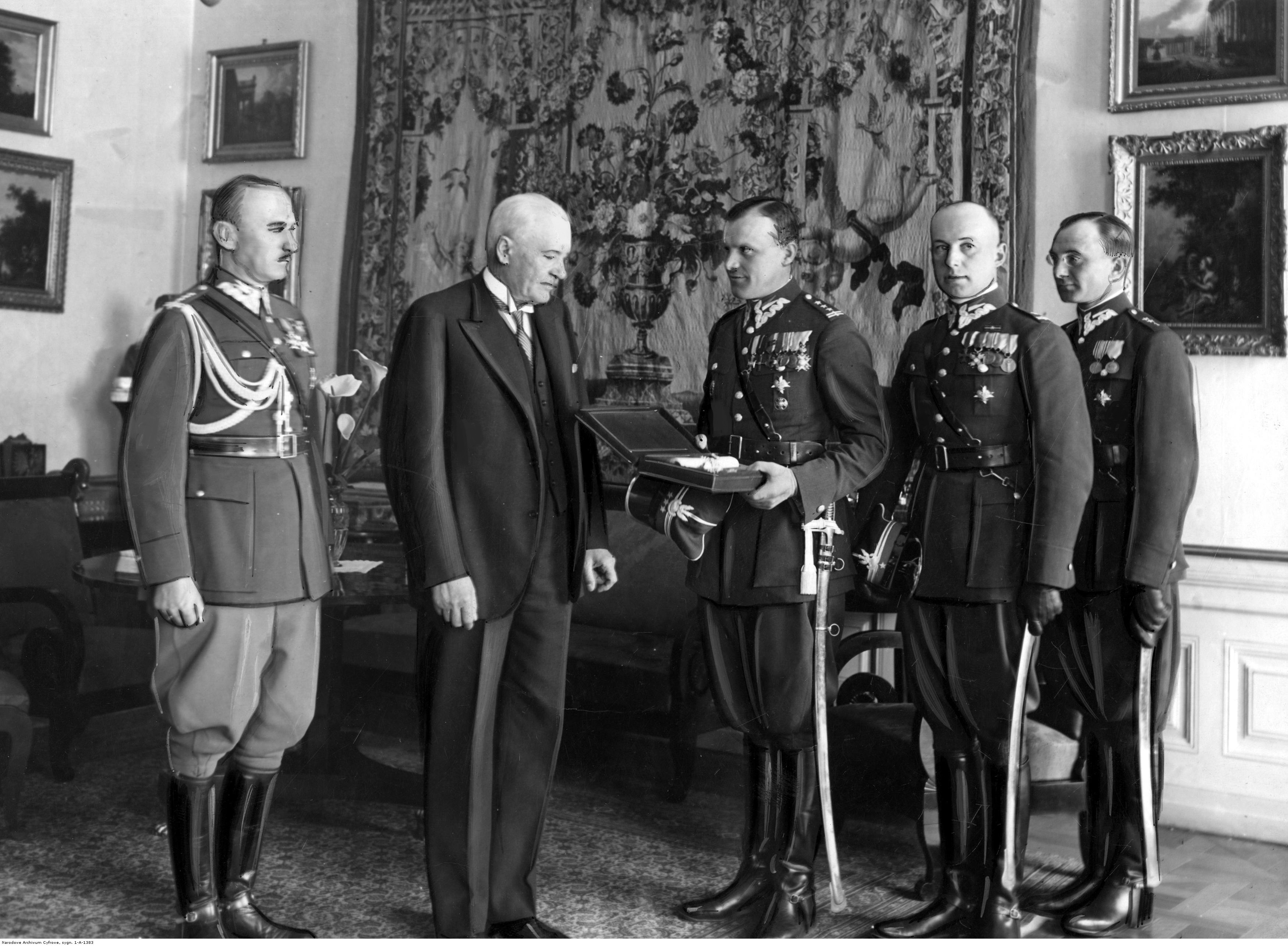 Wręczenie prezydentowi RP Ignacemu Mościckiemu odznaki pułkowej przez delegację 1 Pułku Ułanów Krechowieckich. Widoczni od lewej : pułkownik Jan Głogowski, Ignacy Mościcki, pułkownik Leon Strzelecki, major Tadeusz Mikke, porucznik Tomasz Mineyko. Koncern Ilustrowany Kurier Codzienny - Archiwum Ilustracji. Sygnatura: 1-A-1383